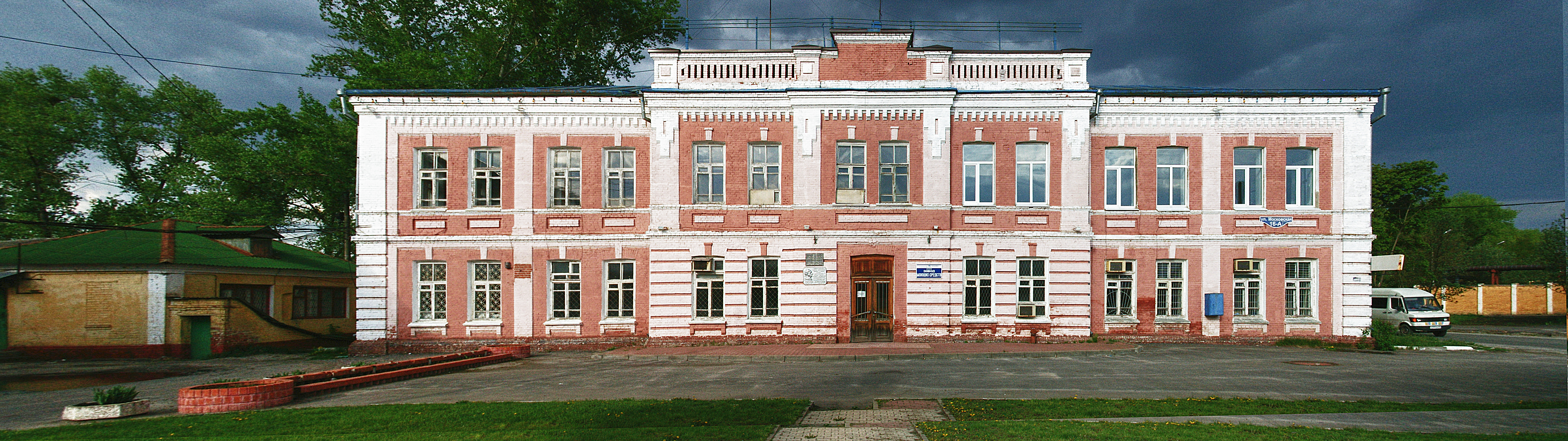 Контора сахарного завода Ребиндера. В этом здании планируется разместить краеведческий музей